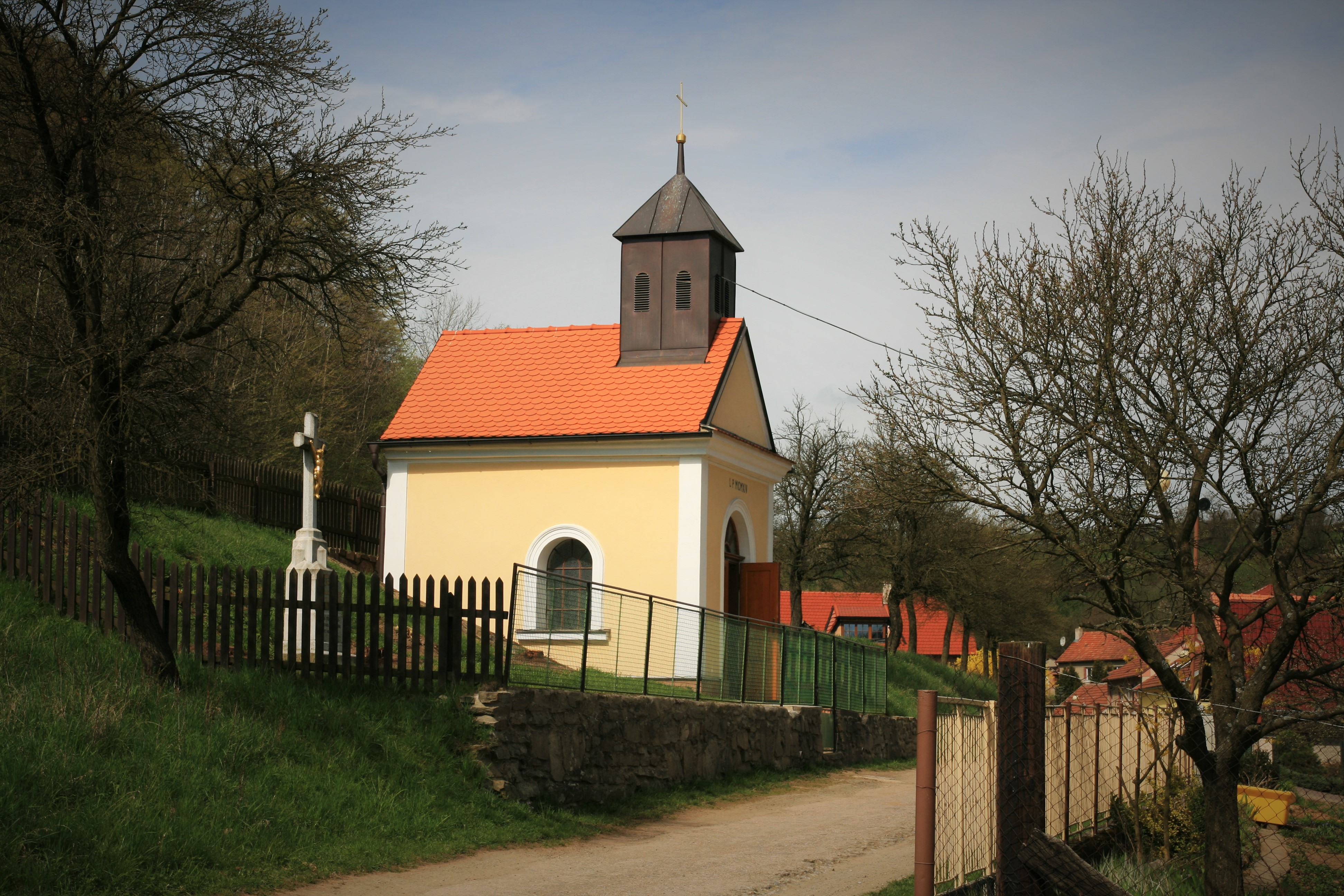 Vesnice Zahrada, část obce Kaly, okres Brno-venkov.